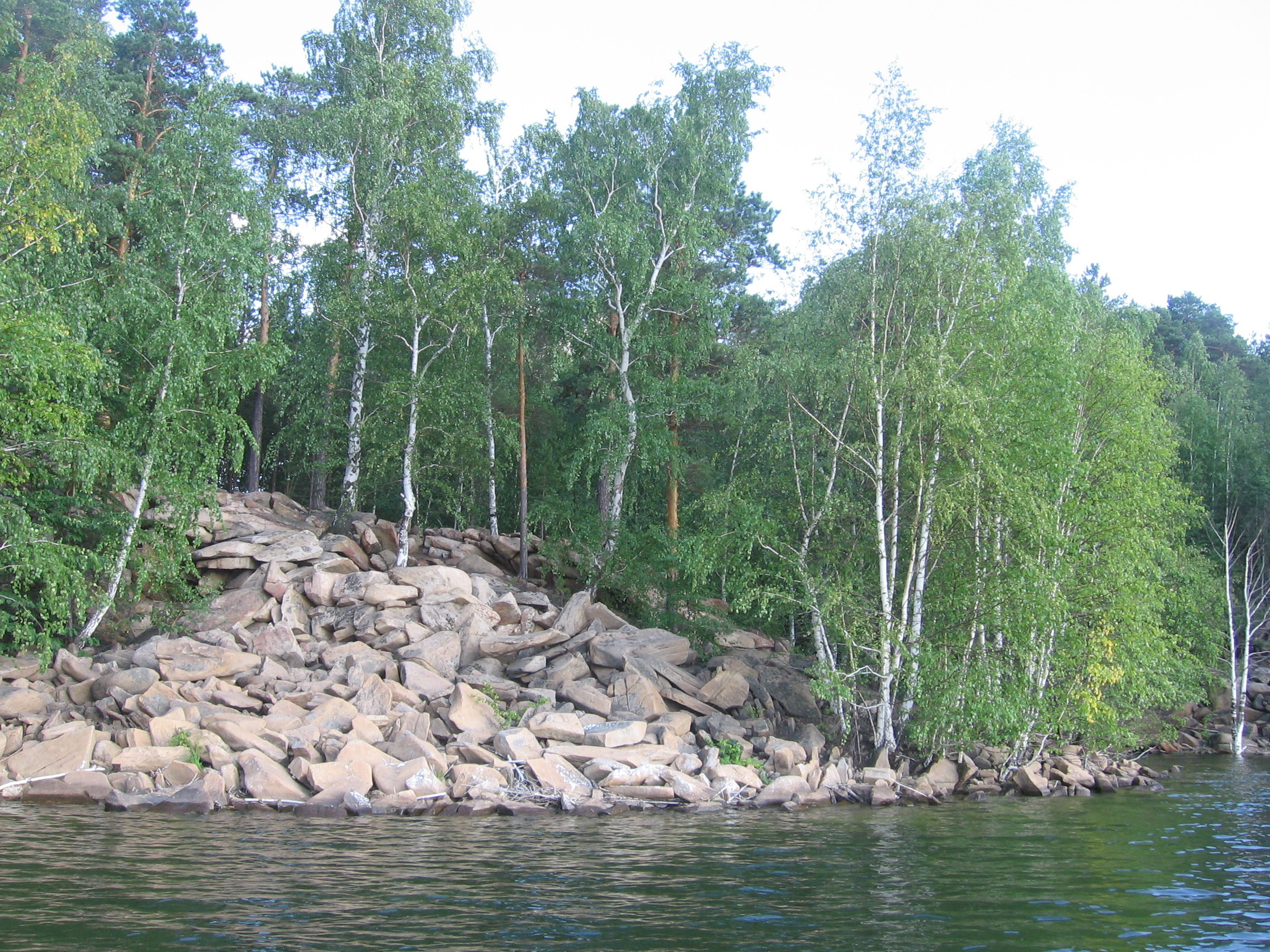 Камни на берегу острова